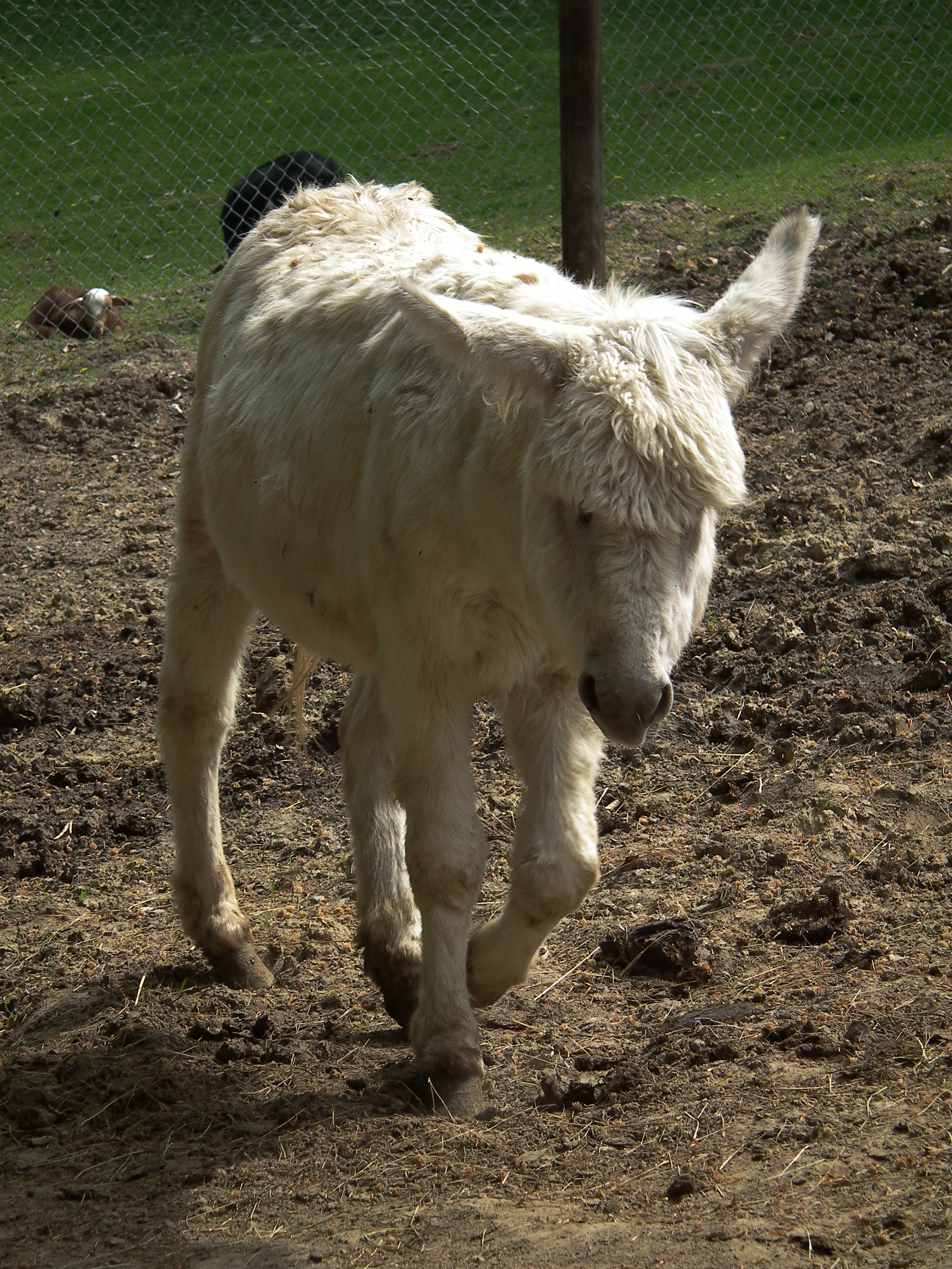 Rufender Esel im Tierpark Bretten (Baden-Württemberg, Deutschland)